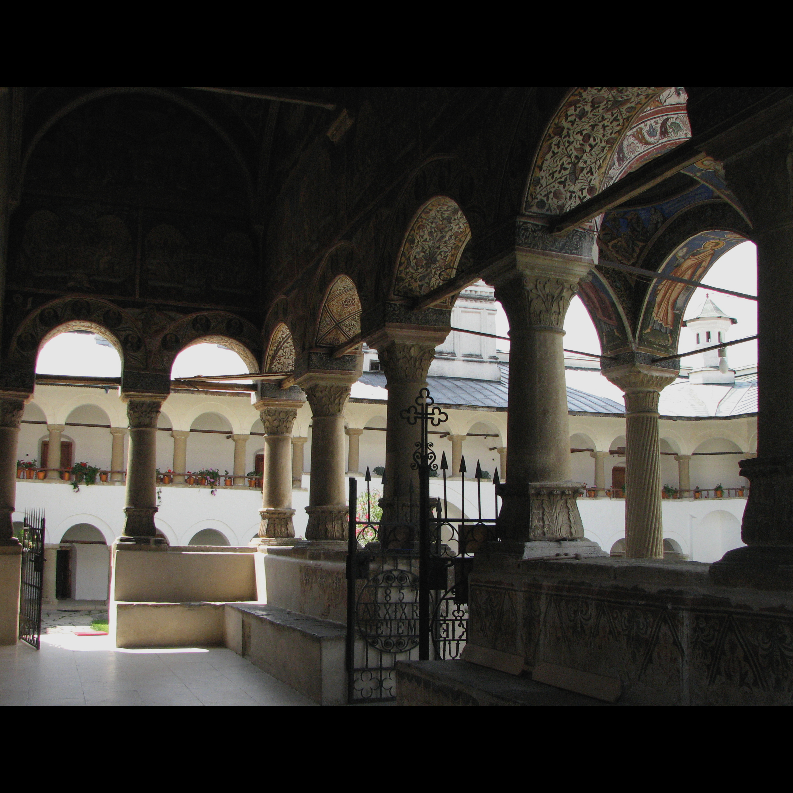 Mânăstirea Hurezi Hurezi Monastery Monastery of Horezu UNESCO World Heritage list